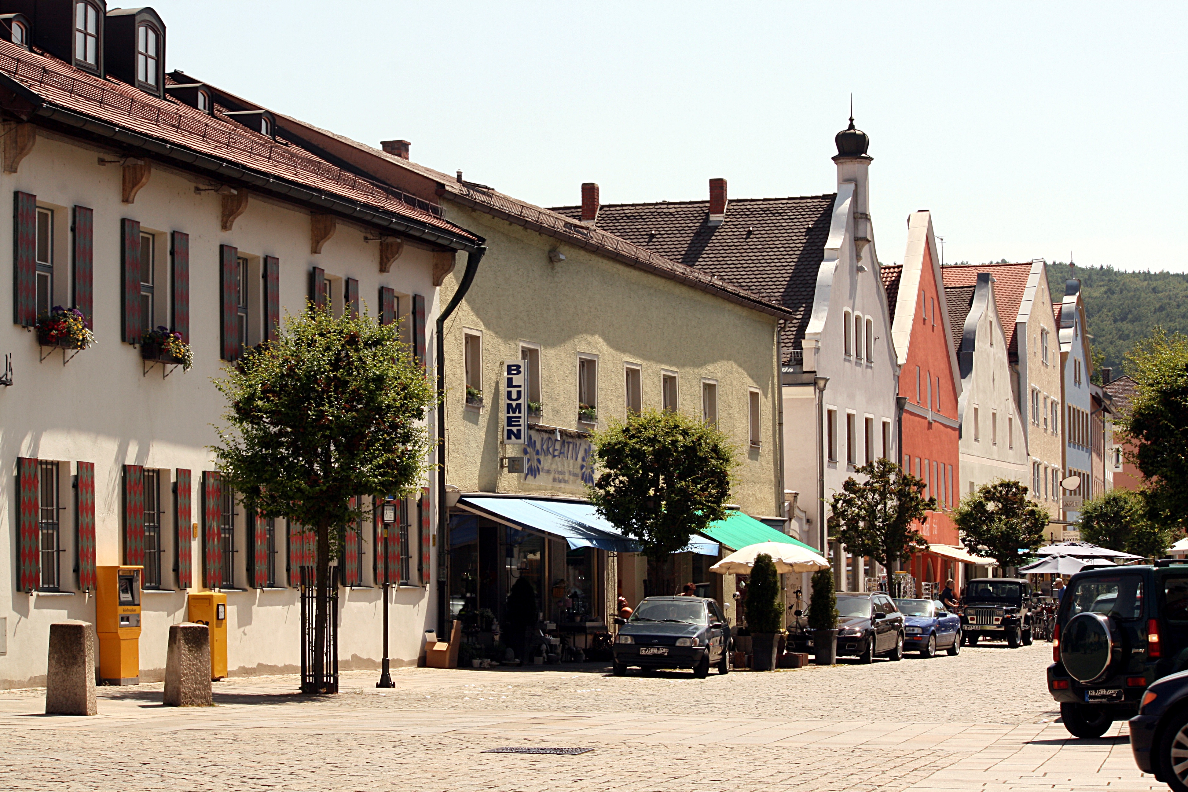 Kelheim_Markt